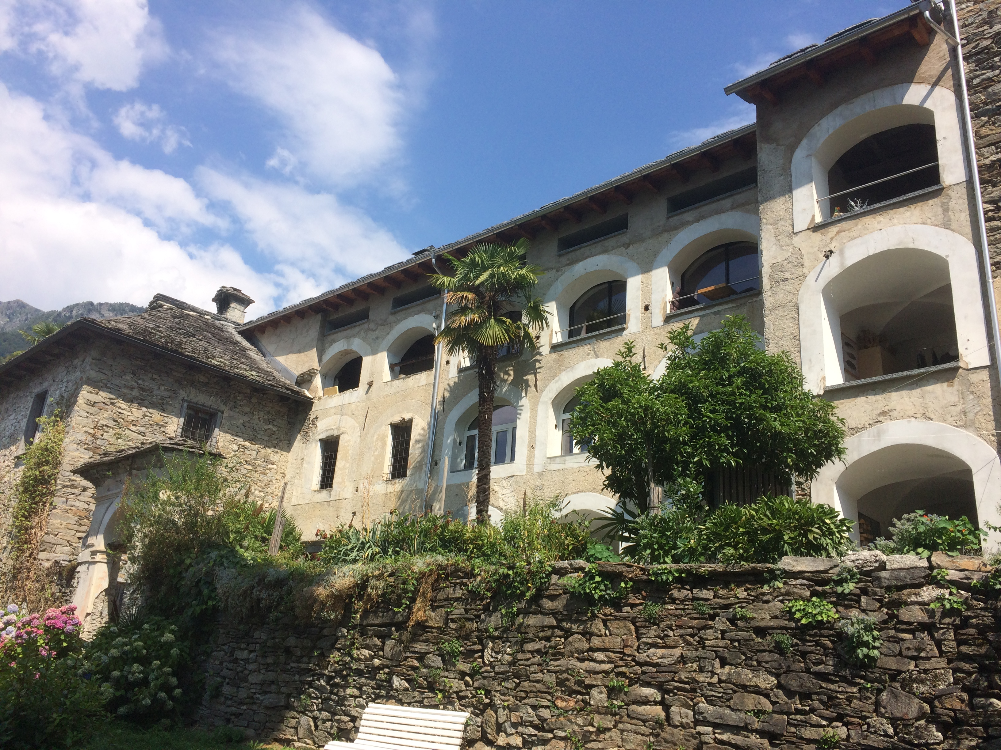 Barockes Wohnhaus in Verdasio, Gemeinde Centovalli (Tessin)